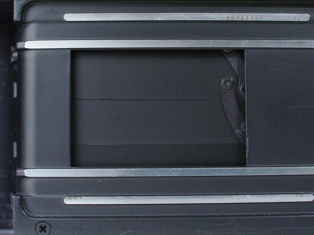 Bildbeschreibung: Vertikal ablaufender Metalllamellenschlitzverschluss (Copal, Minolta XE-5) in gespanntem Zustand. Quelle: Eigenes Foto Fotograf/Zeichner: Smial Datum: 19.04.2006